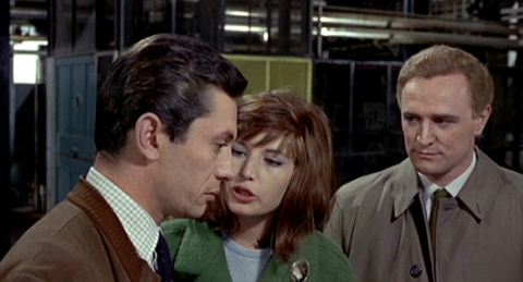 Carlo Chionetti, Monica Vitti és Richard Harris (mint Ugo, Giuliana és Corrado) a Vörös sivatag c. olasz-francia filmben, rendezte Michelangelo Antonioni, 1964